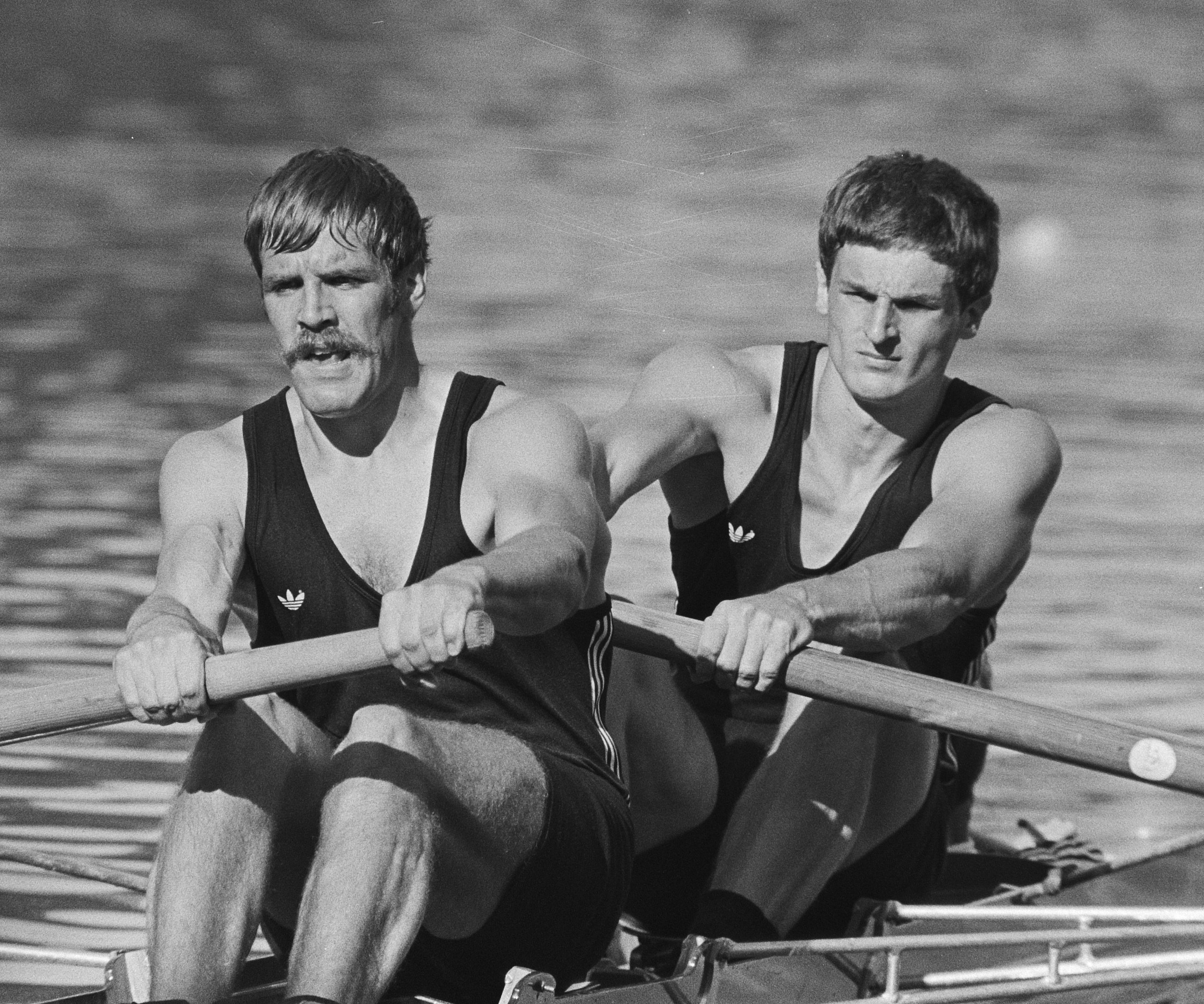 Nationale roeikampioenschappen op de Bosbaan; winnaars 2 Peter van de Plas (l) en Evert Kroes